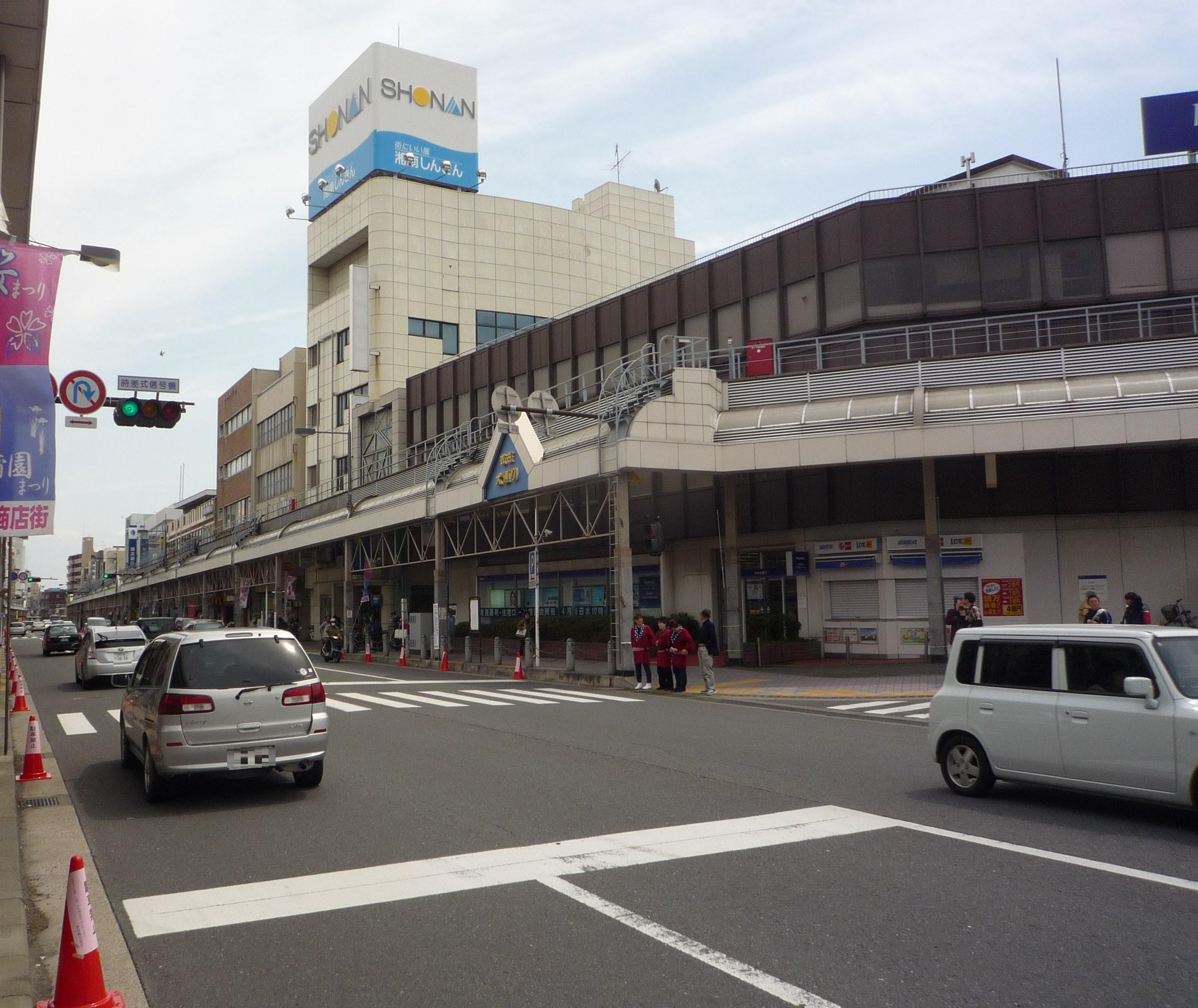 衣笠大通りの画像